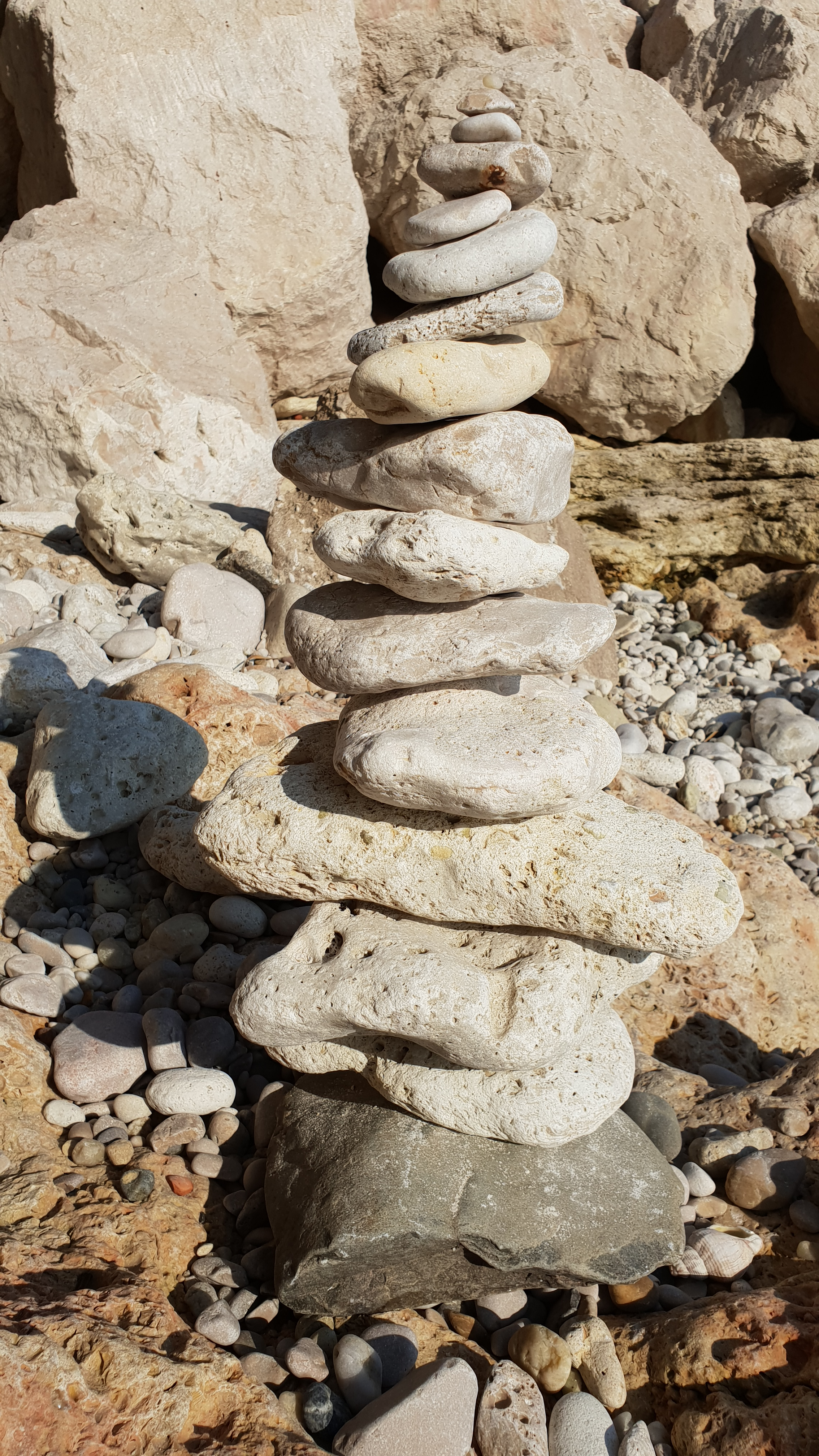 Équilibre de pierres sur une plage de Sausset-les-Pins (Bouches-du-Rhône, France)